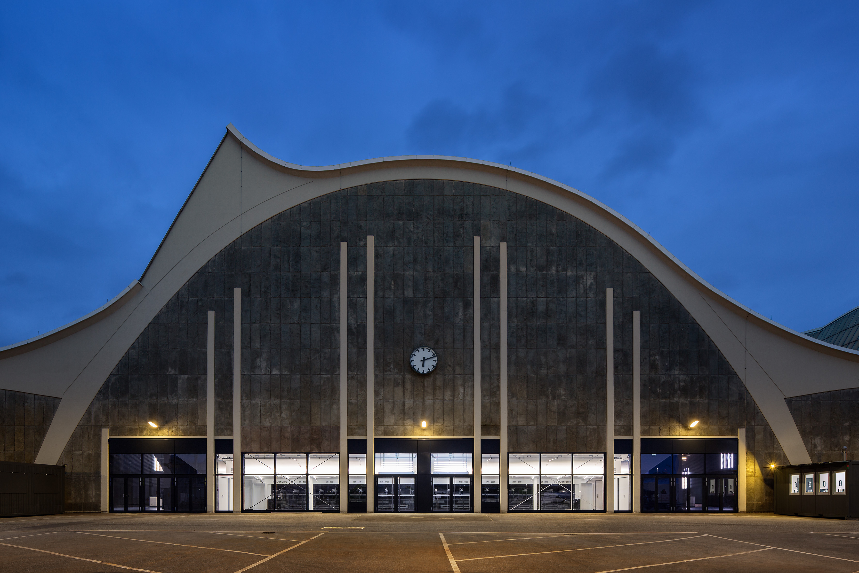 Mehr! Theater am Großmarkt, Aussenansicht